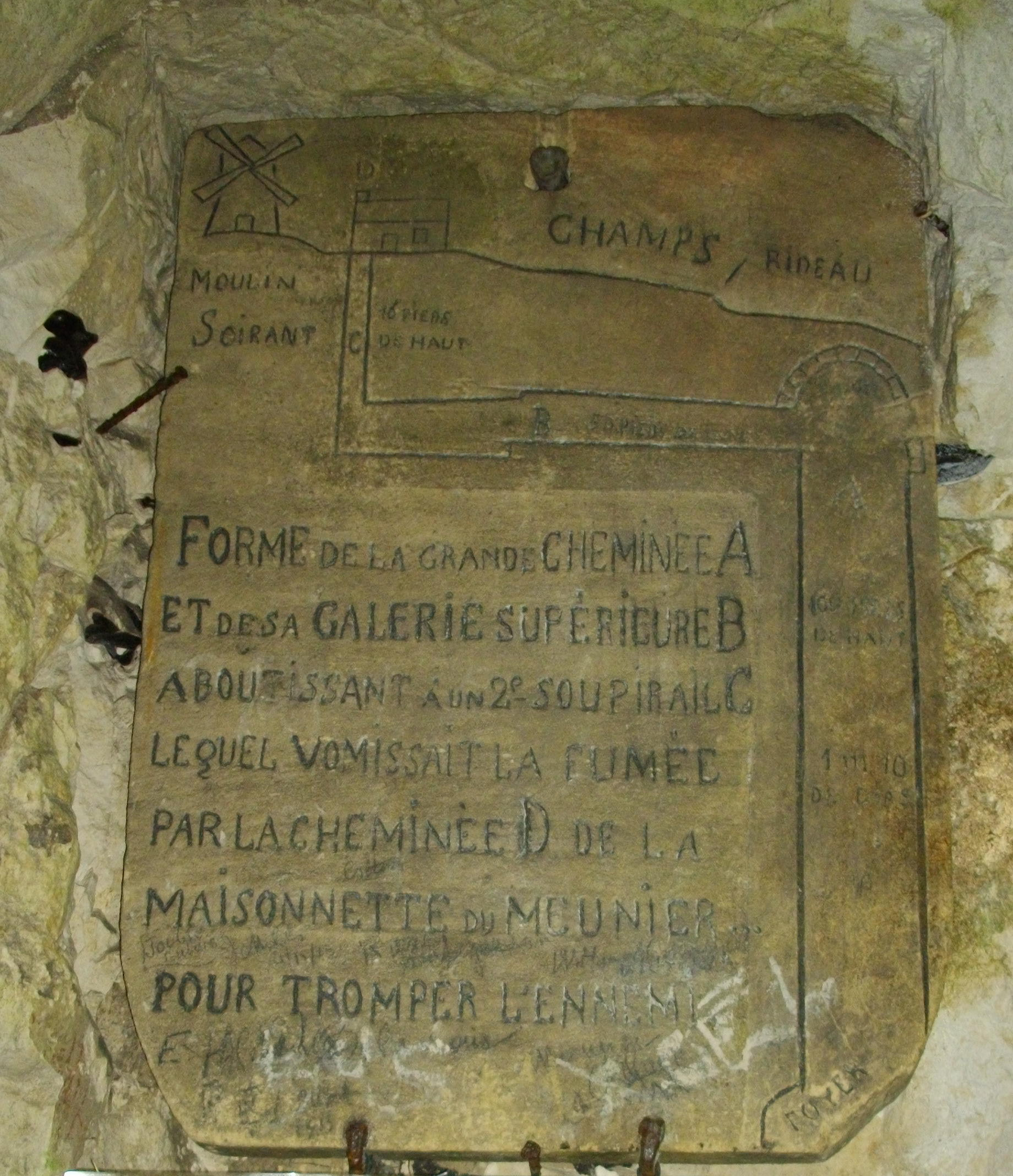 plaque explicative de la grande cheminée